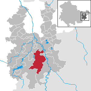 Langenwetzendorf in Thuringia - District Greiz